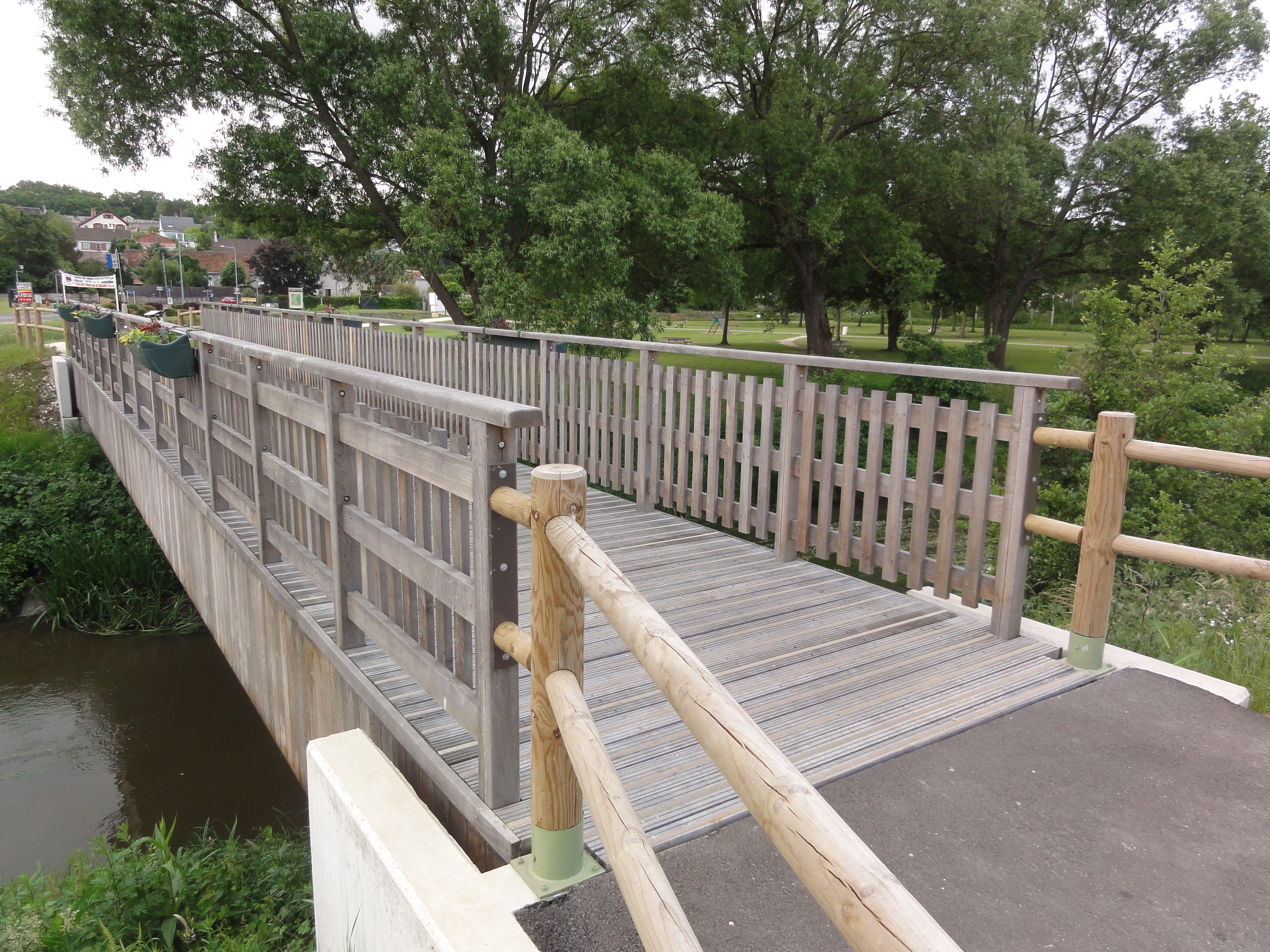 Chailles (Loir-et-Cher) pont piste cyclable et pietonne